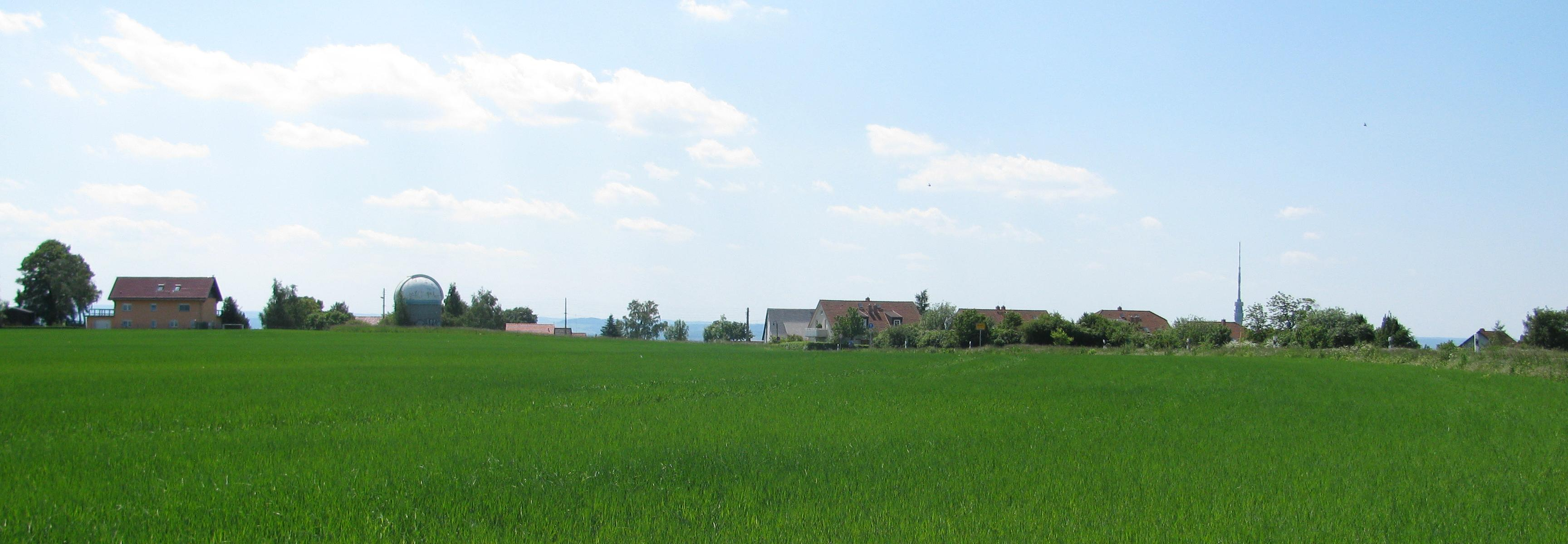 Gönnsdorf, Ortsteil von Dresden, mit seiner Sternwarte. Im Hintergrund rechts der obere Teil des Dresdner Fernsehturms.